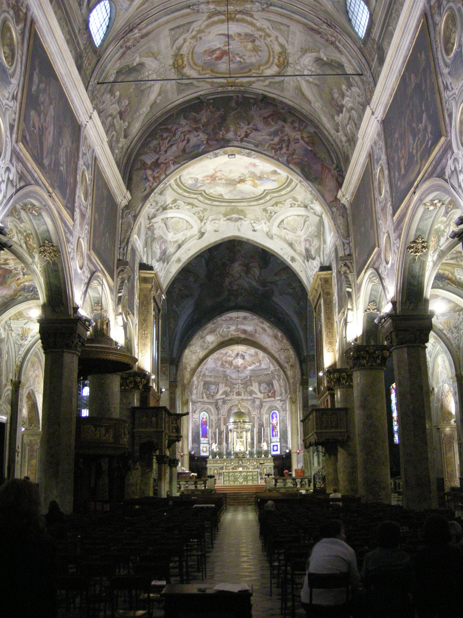 Duomo di monza, interno